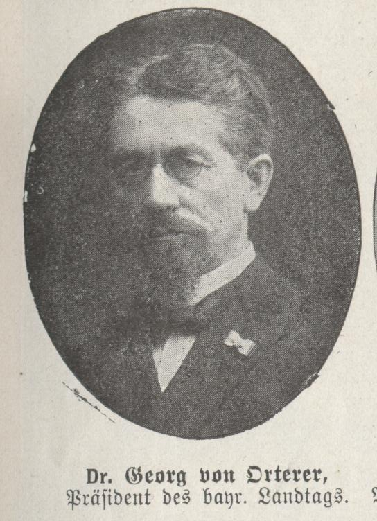 Georg von Orterer, Präsident des Bayerischen Landtags, Zentrum